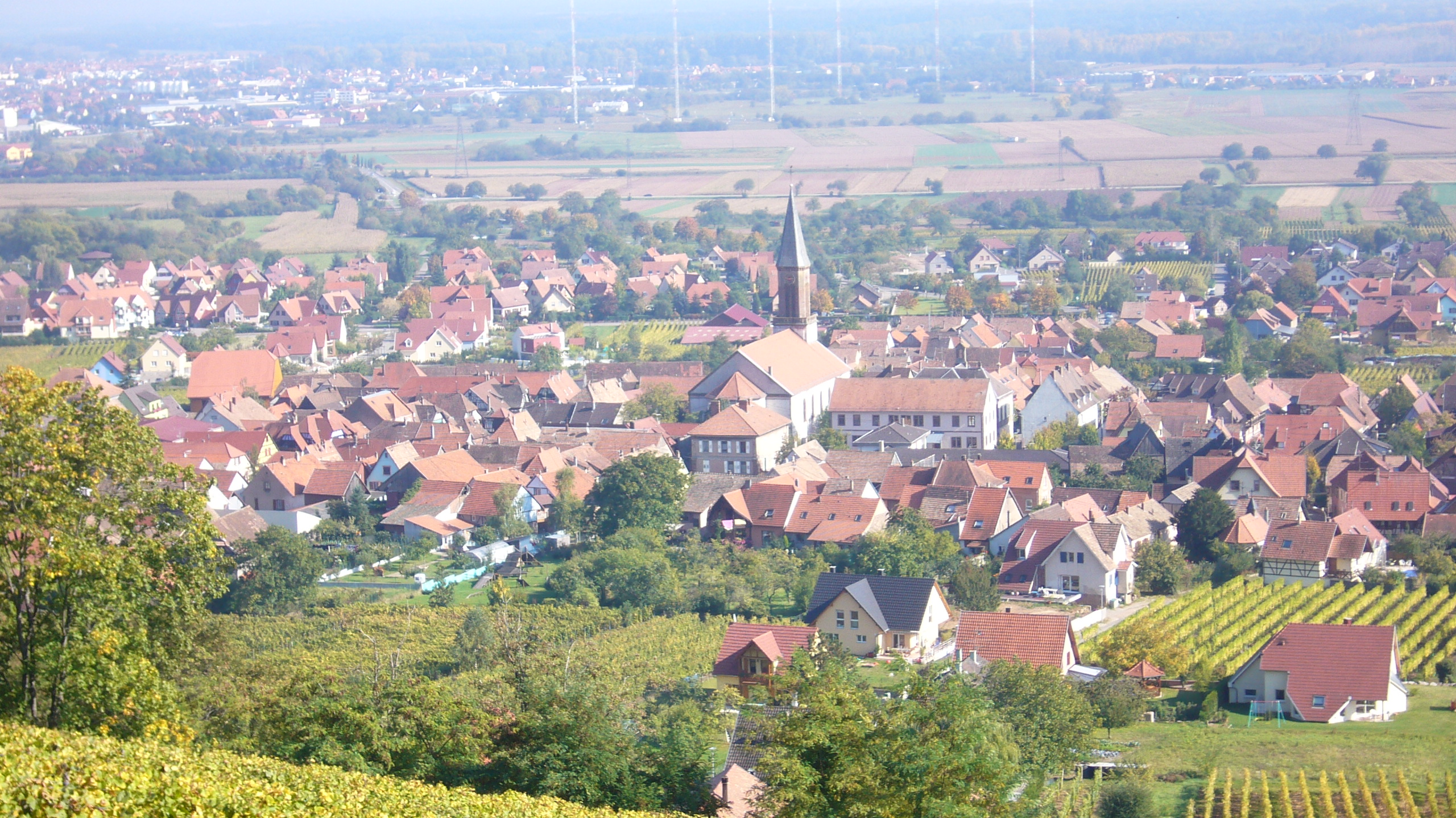 Vue sur Kintzheim depuis le château